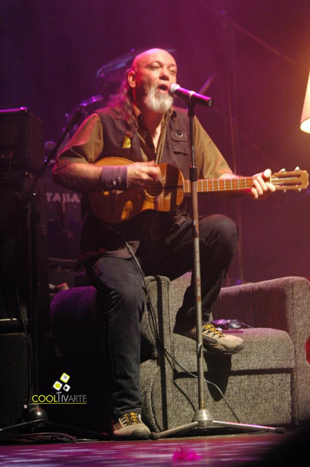 Tabaré Rivero en Sala Zitarrosa - 25 años de La Tabaré. Foto: Federico Meneses